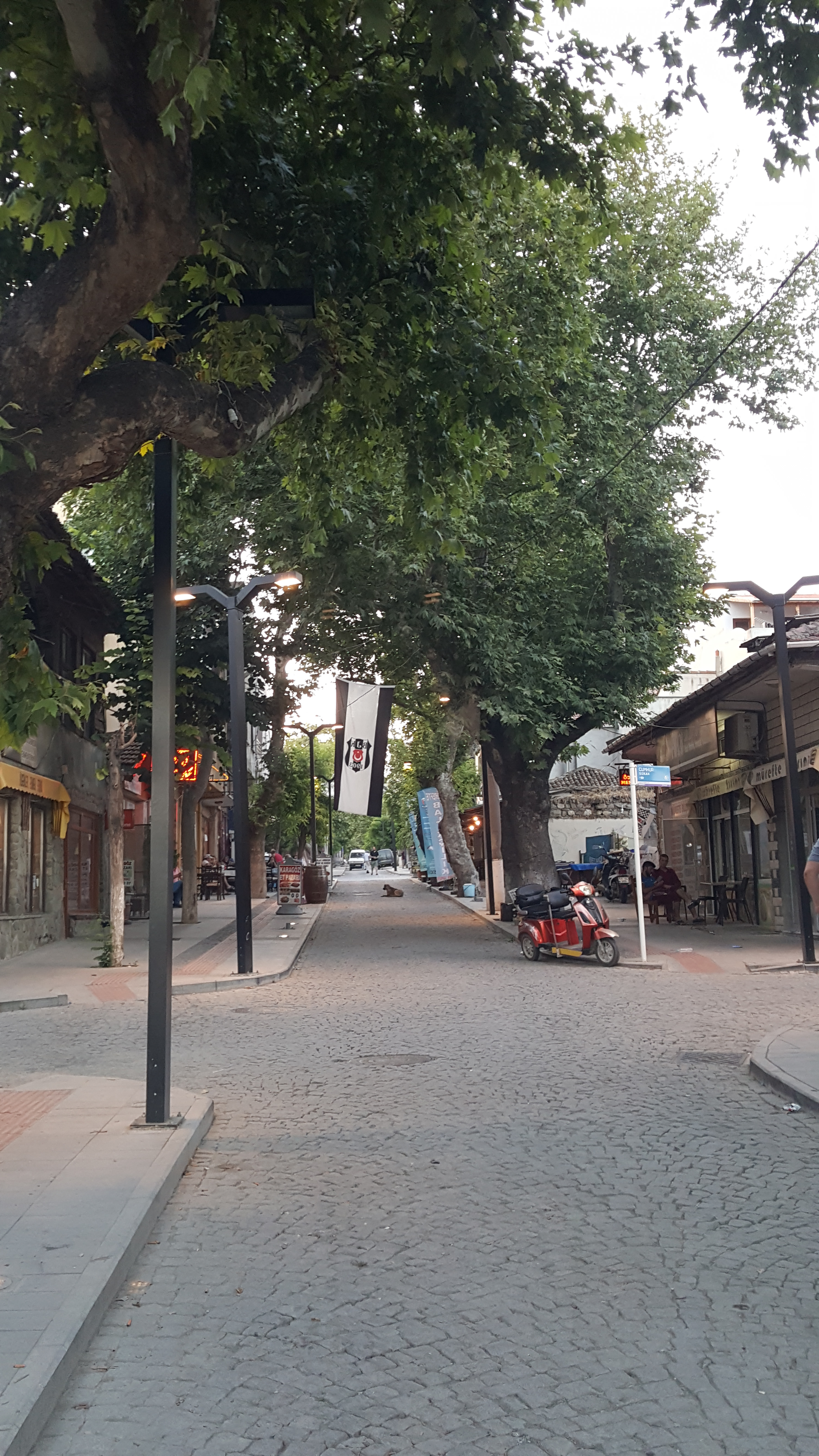 Mürefte, Şarköy, Tekirdağ